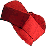 Berretta cardinalizia.